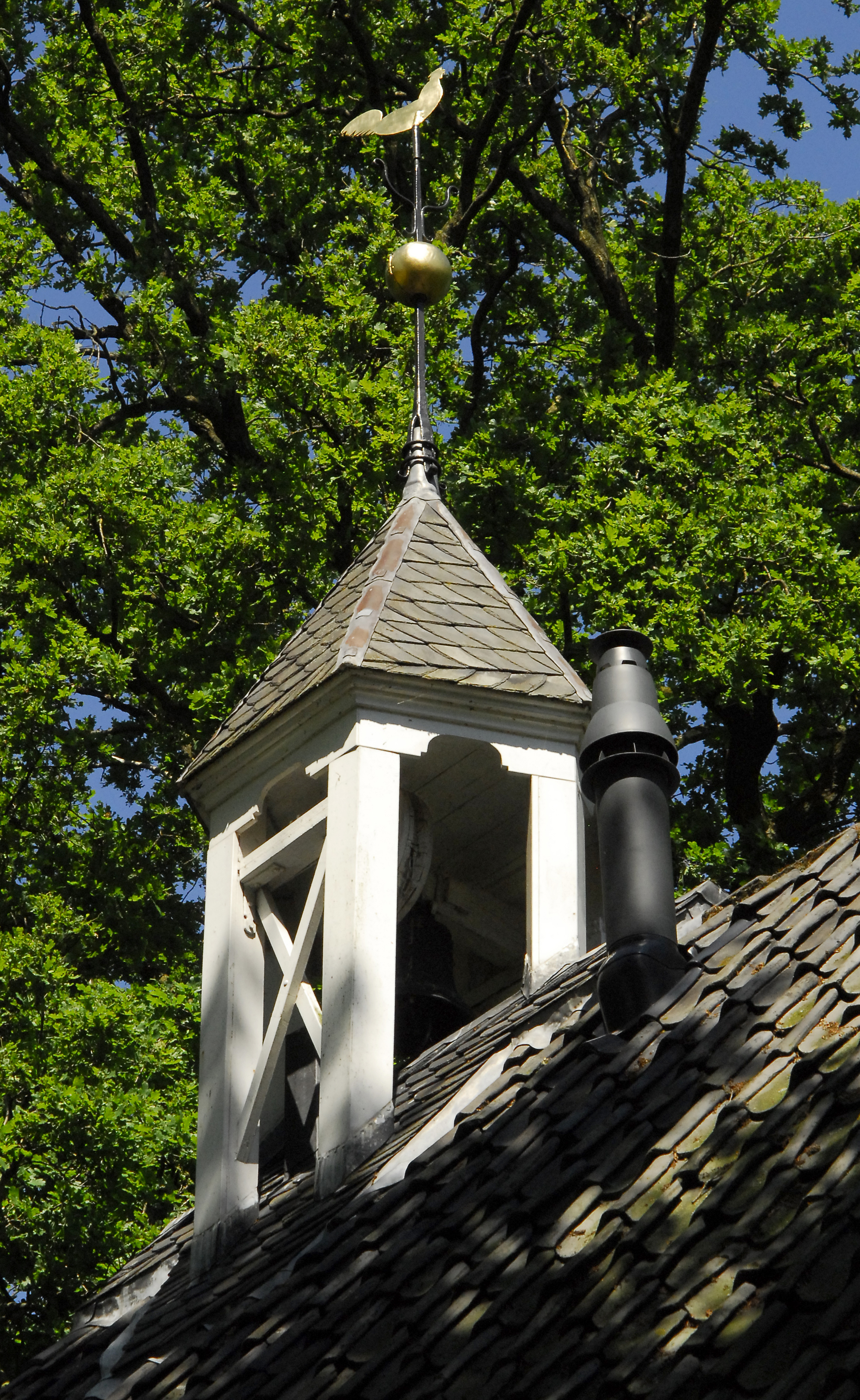 Klokkenstoel op de Antoniuskapel te Sinderen (Oude IJsselstreek)